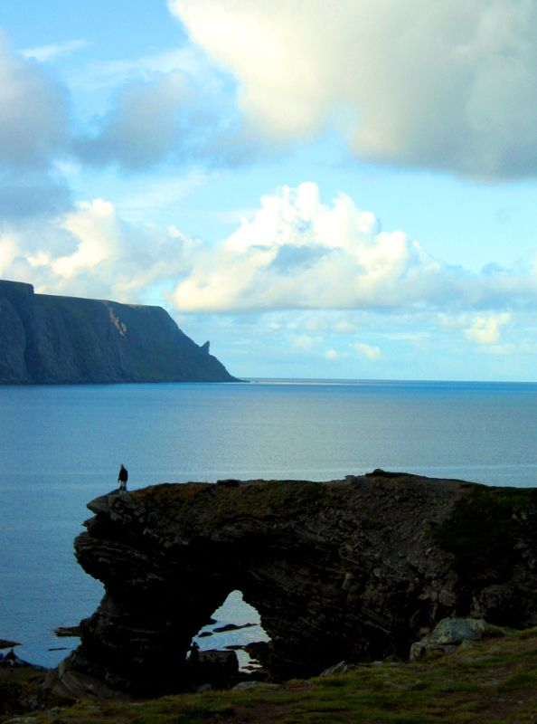 Hornet og Kirkeporten ved Vestfjorden Nordkapp, Norway